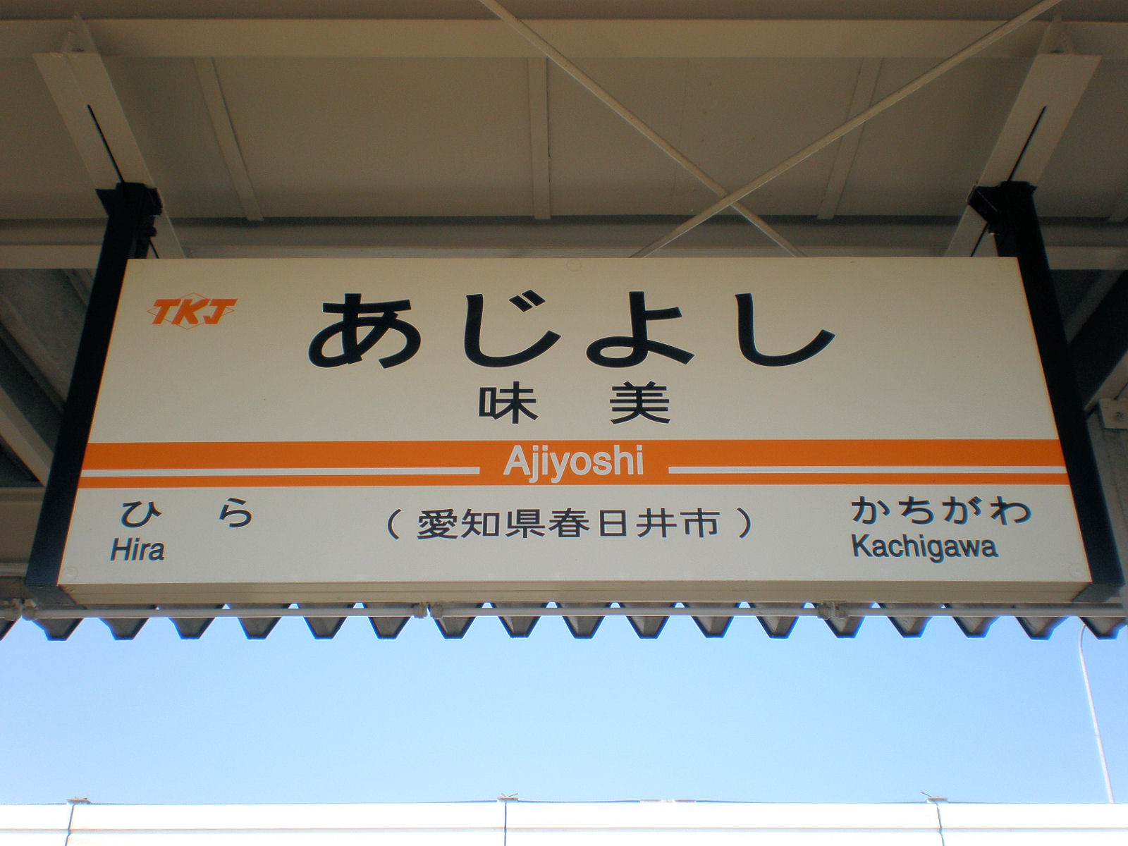 愛知県春日井市にある東海交通事業味美駅